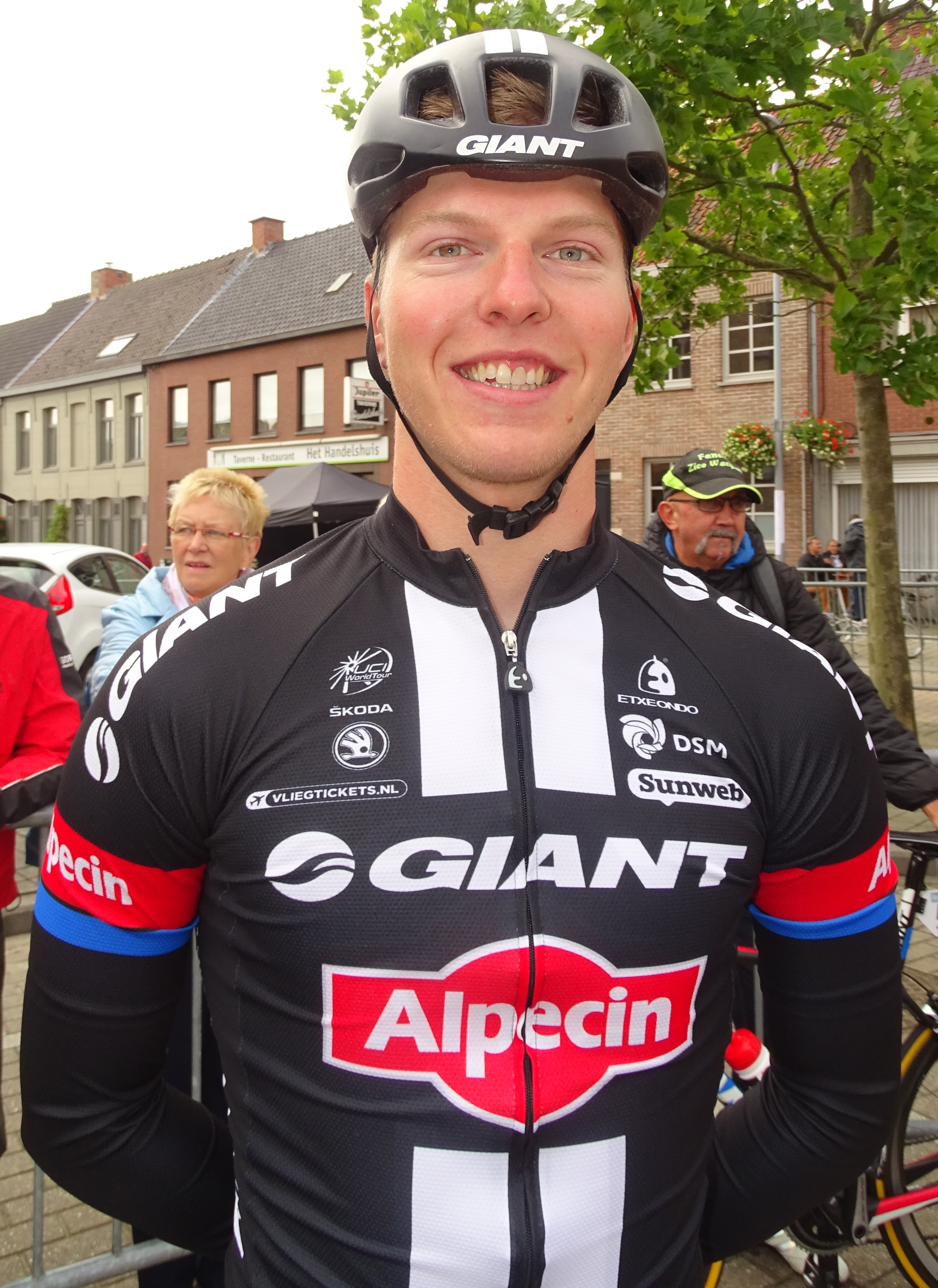 Reportage réalisé le vendredi 18 septembre à l'occasion de l'arrivée du Championnat des Flandres 2015 à Koolskamp (Ardooie), Belgique.